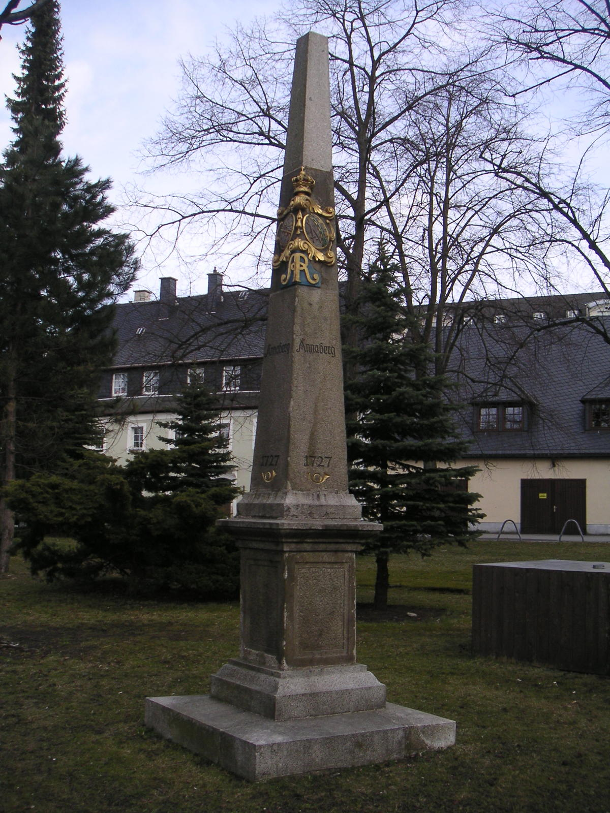 kursächsische Postmeilensäule von 1727 in Annaberg, Köselitzplatz